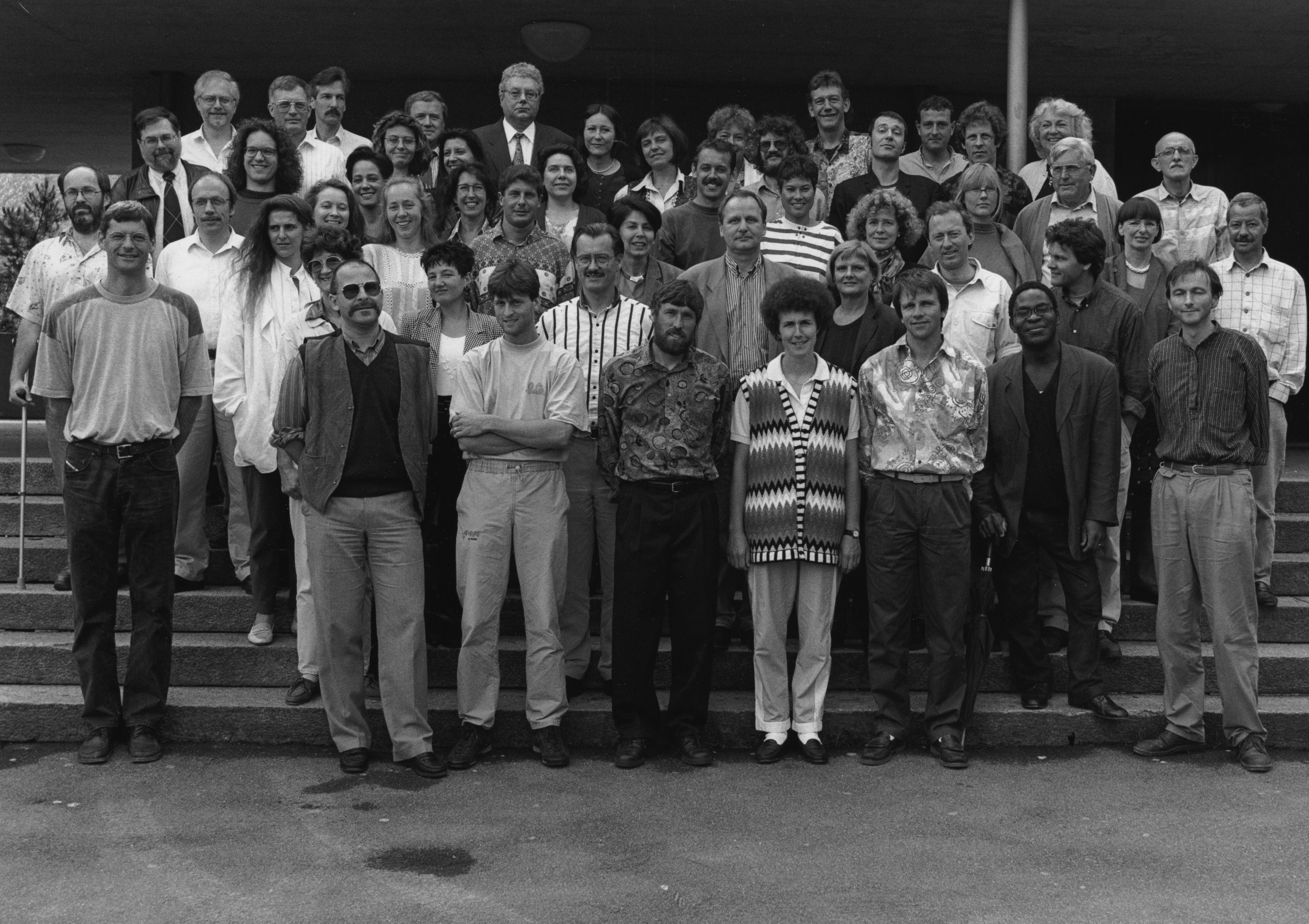 Lehrerschaft der Kantonsschule Trogen mit Rektor Willi Eugster in der Mitte (mit längs gestreiftem Hemd und Brille), 1994